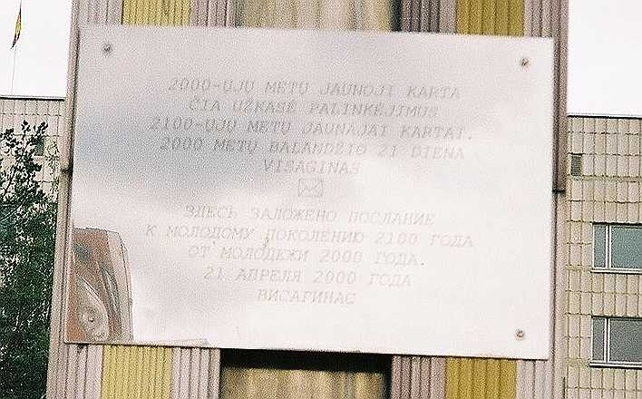 Tablica pamiątkowa na obelisku-pomniku z licznikiem Geigera na głównym placu Visaginas na Litwie (lipiec 2004). Tłumaczenie polskie: Tutaj złożono posłanie do młodego pokolenia roku 2100 od młodzieży z roku 2000. 21 kwietnia 2000 Visaginas Napis w języku litewskim: 2000-ŲJŲ METŲ JAUNOJI KARTA ČIA UŽKASĖ PALINKĖJIMUS 2100-ŲJŲ METŲ JAUNAJAI KARTAI. 2000 METŲ BALANDŽIO 21 DIENA VISAGINAS Napis w języku rosyjskim: ЗДЕСЬ ЗAЛOЖEНO ПOCЛAHИE K MOЛOДOMУ ПOKOЛEHИЮ 2100 ГOДA OT MOЛOДЁЖИ 2000 ГOДA. 21 AПPEЛЯ 2000 ГOДA BИCAГИHAC.